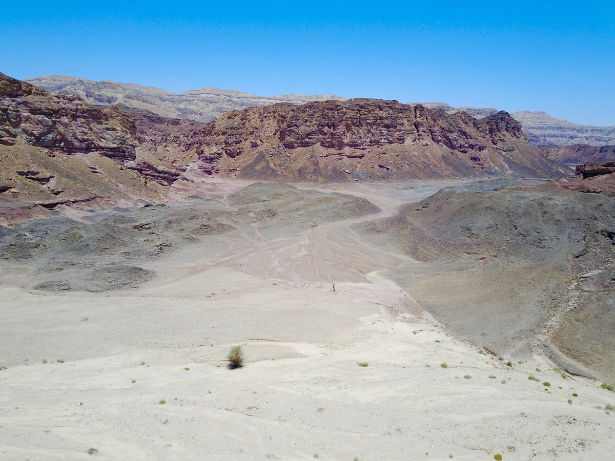 . עמק ססגון שוכן בצפון מזרח בקעת תמנע כ-25 ק"מ מצפון לאילת. על העמק מתנהל מאבק כנגד בניית מתחם מלונות גדול. בתמונה: חלקו המזרחי של עמק ססגון, מבט מדרום (צילום מרחפן), ממול- הר מכרות, משמאל- גבעה מצוקית ללא שם. שתי הגבעות בנויות מאבני חול מתצורות נטפים ושחורת.